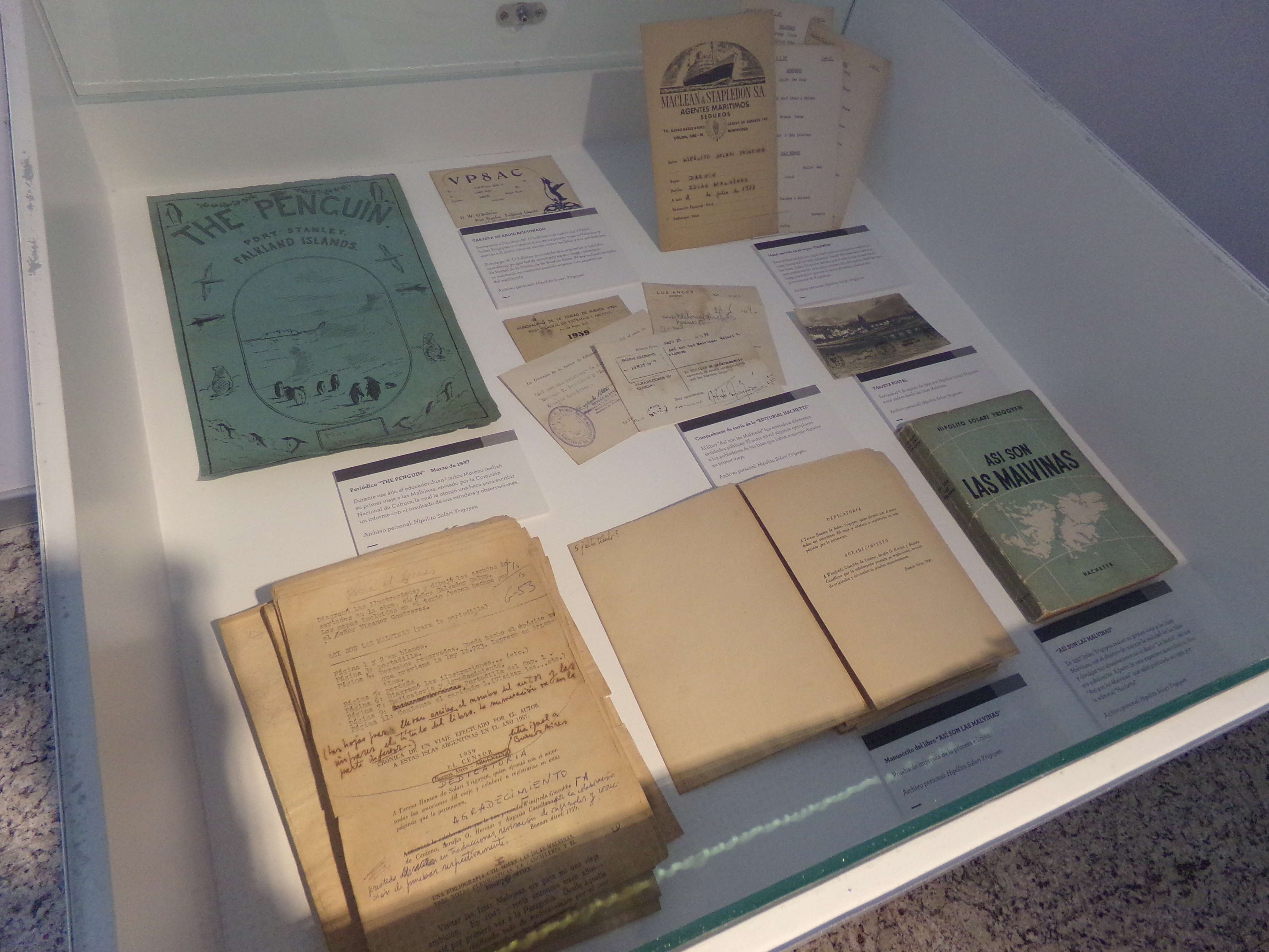 Sector dedicado a Hipólito Solari Yrigoyen. Museo Malvinas e Islas del Atlántico Sur, Núñez, Buenos Aires, Argentina.